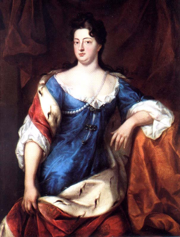 Sophie Charlotte, Königin in Preußenlabel QS:Lde,"Sophie Charlotte, Königin in Preußen"